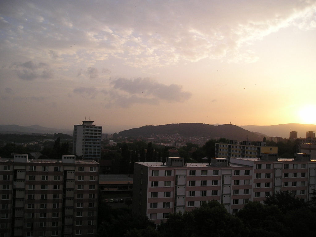 Střížovický vrch, pohled ze severovýchodu.